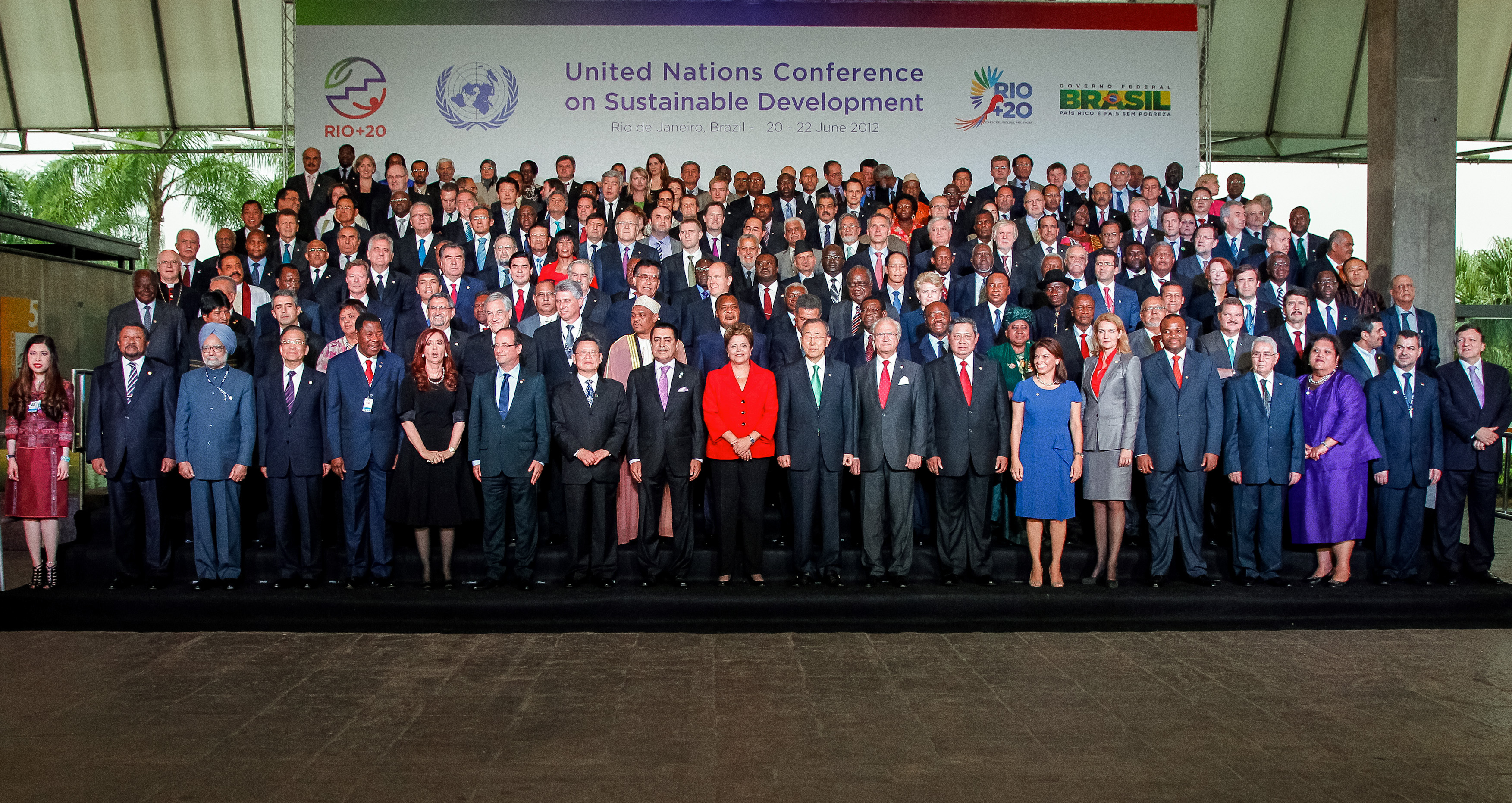 Presidenta Dilma Rousseff posa para foto oficial da Conferência das Nações Unidas sobre Desenvolvimento Sustentável (Rio+20). Rio de Janeiro - RJ, 20/06/2012 Foto: Roberto Stuckert Filho/PR